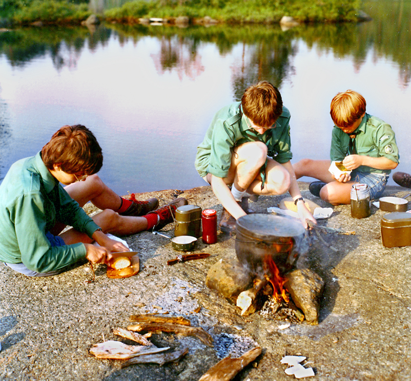 Jungen der Waldjugend kochen auf der Sommerfahrt 1984 an einem südnorwegischen See.